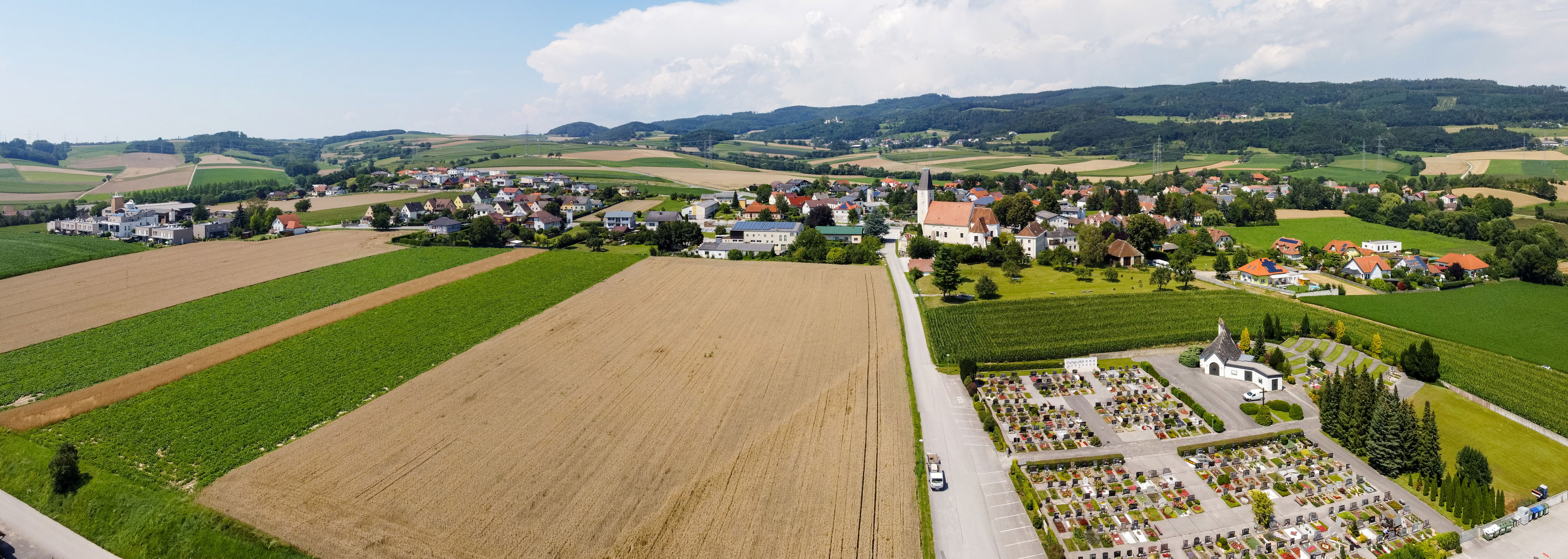 Hafnerbach 'Hafnerbach' (Q675054)